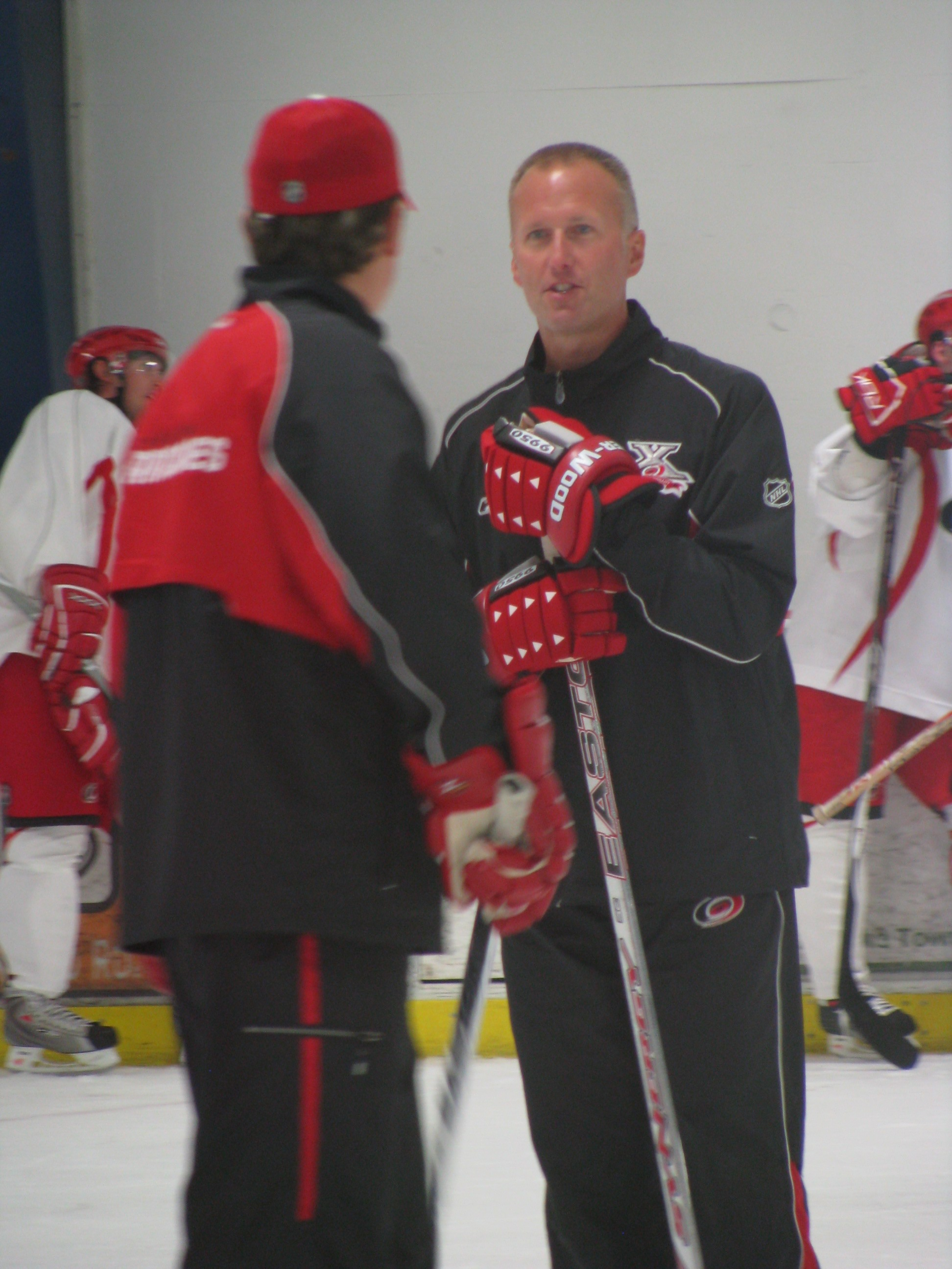 Tom Barrasso